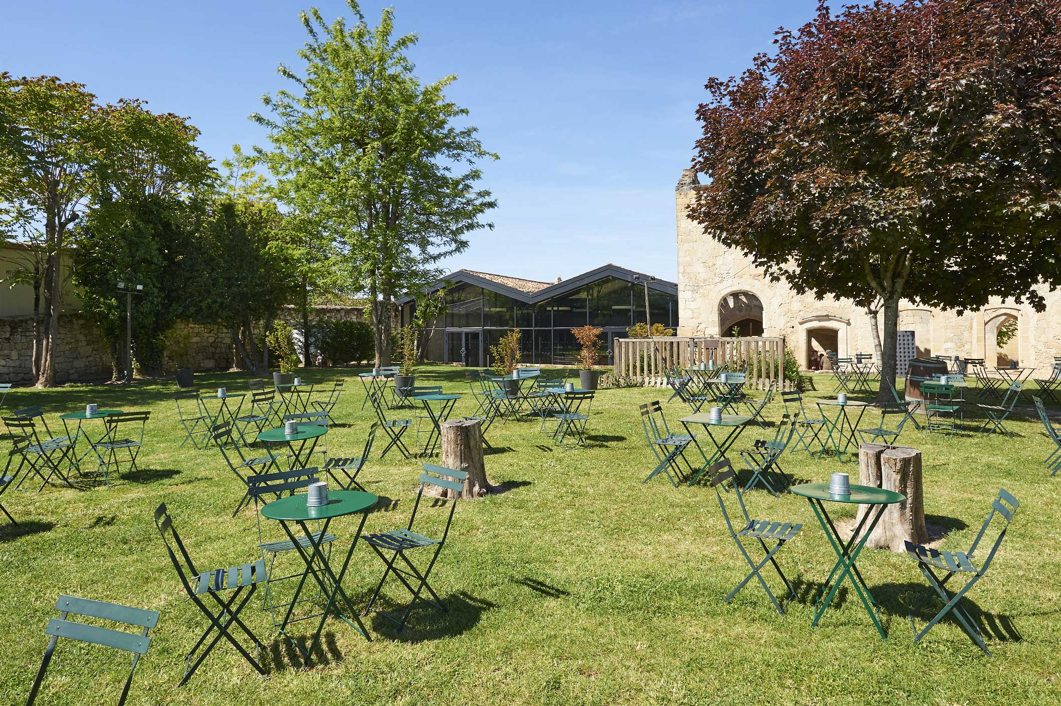 Jardin du Cloître des Cordeliers